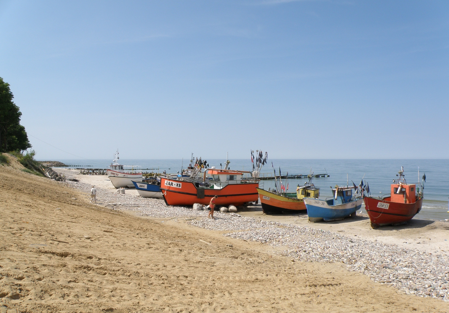 Jarosławiec, zachodniopomorskie, powiat sławieński. Przystań portowa